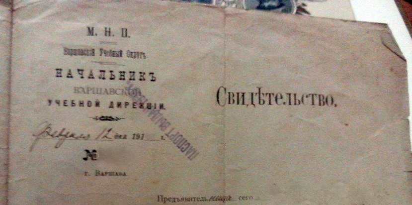 Свидетельство обо окончании гимназии. г Варшава. Россия.